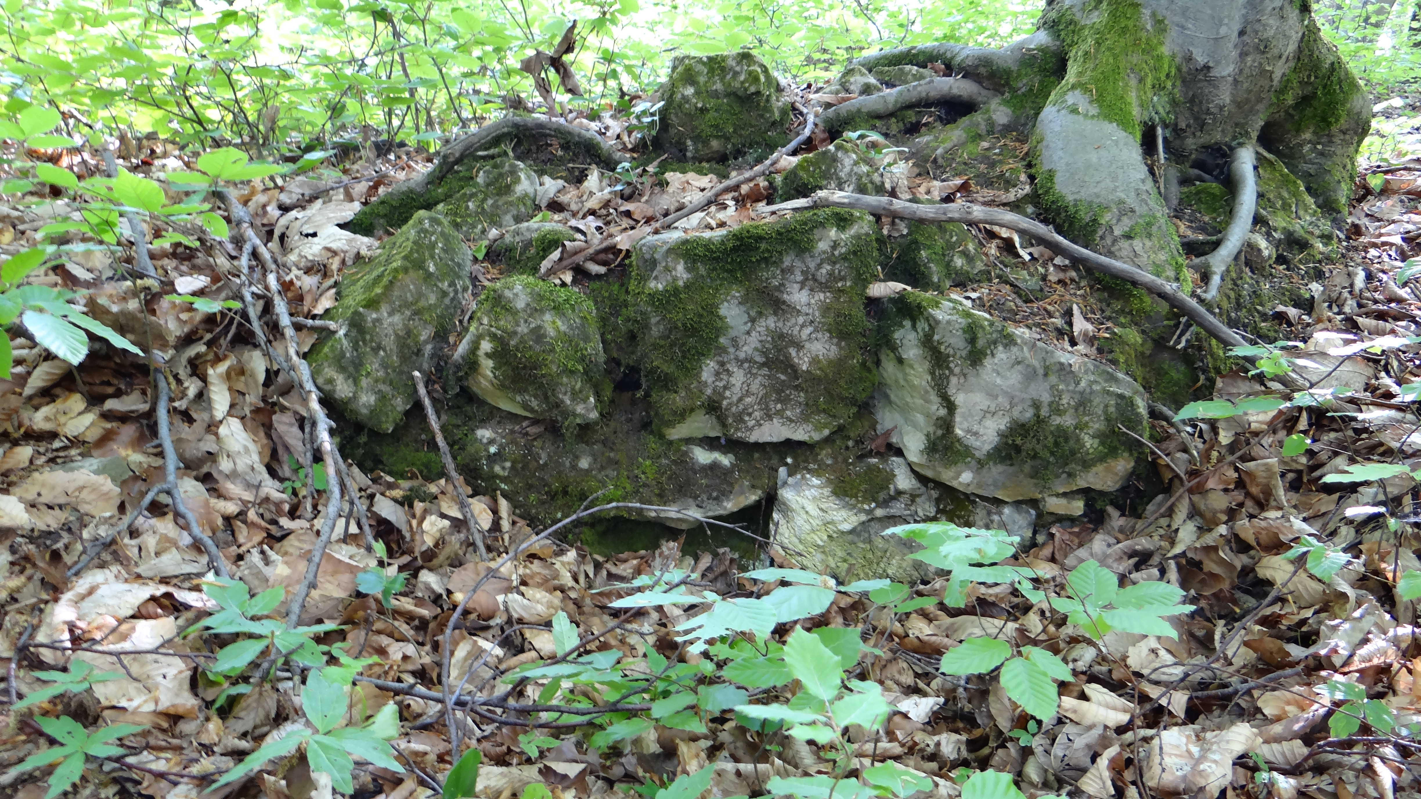 Ruševine gradu Gračeno 2014